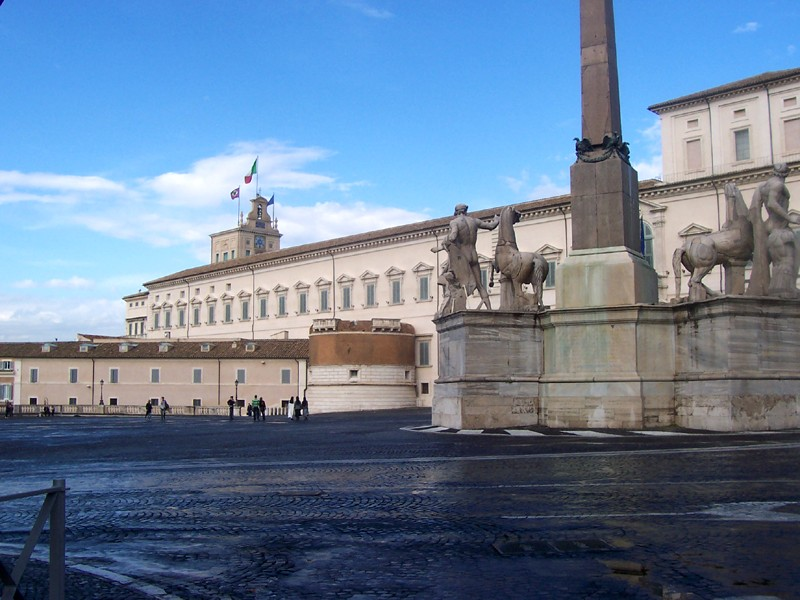 Roma - Palazzo del Quirinale